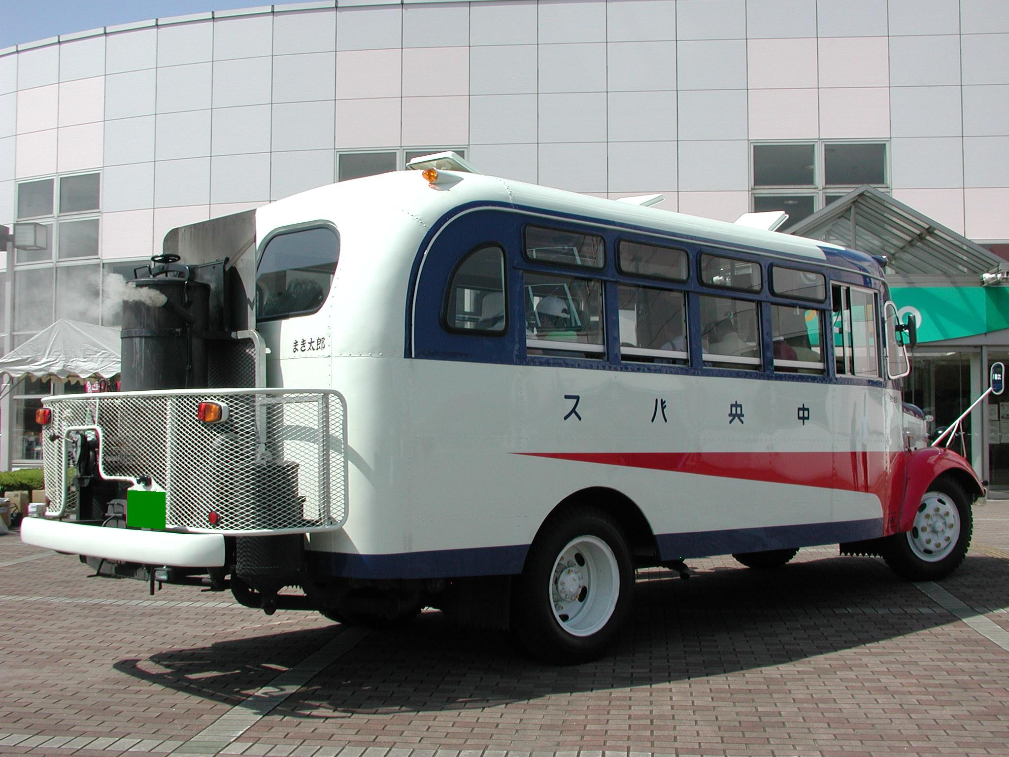 北海道中央バス：まき太郎：後部イトーヨーカドー八戸沼館店（ピアドゥ内）にて（南部バスなどが主催するイベント内より） ※：自家用登録のため、ナンバー部分に隠し処理加工済み。